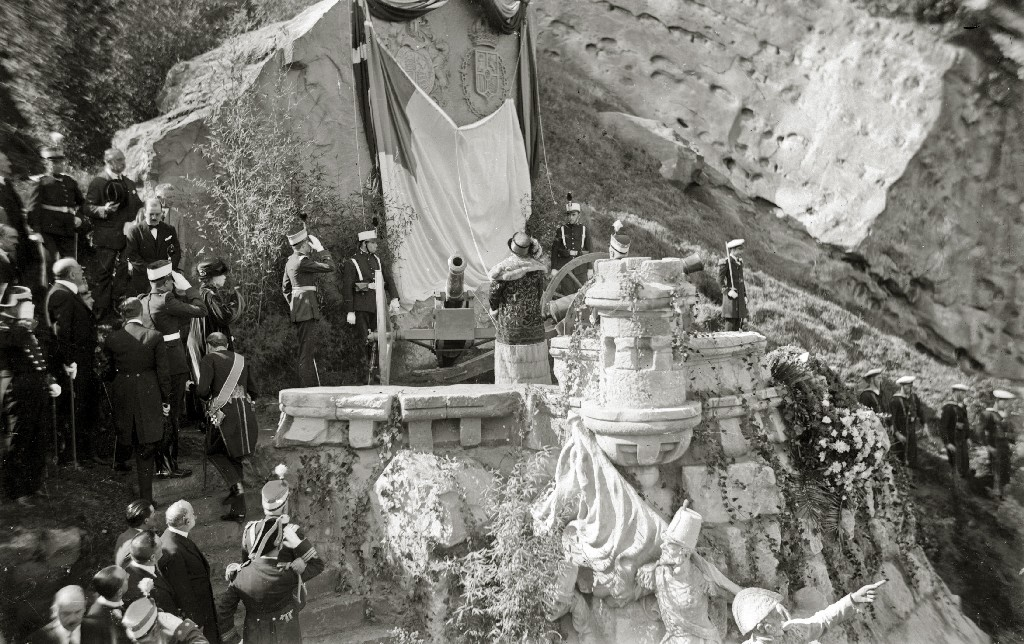 Título original: Inauguración del Cementerio de los Ingleses presidido por la reina Victoria Eugenia (11/11) Localización: San Sebastián (Guipúzcoa)